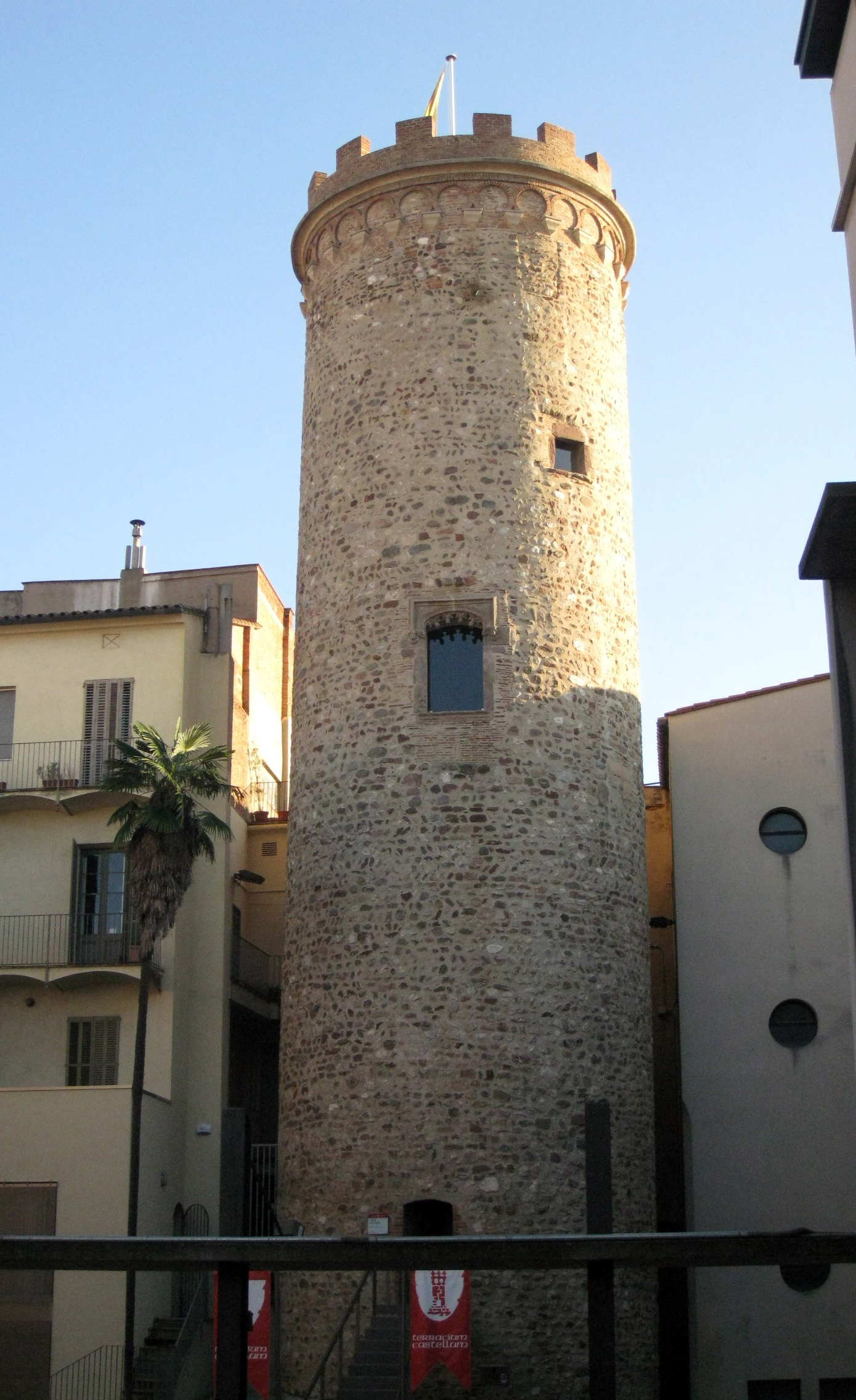 Torre del Palau, torre mestra de l'antic castell palau de Terrassa, l'únic vestigi que en queda.